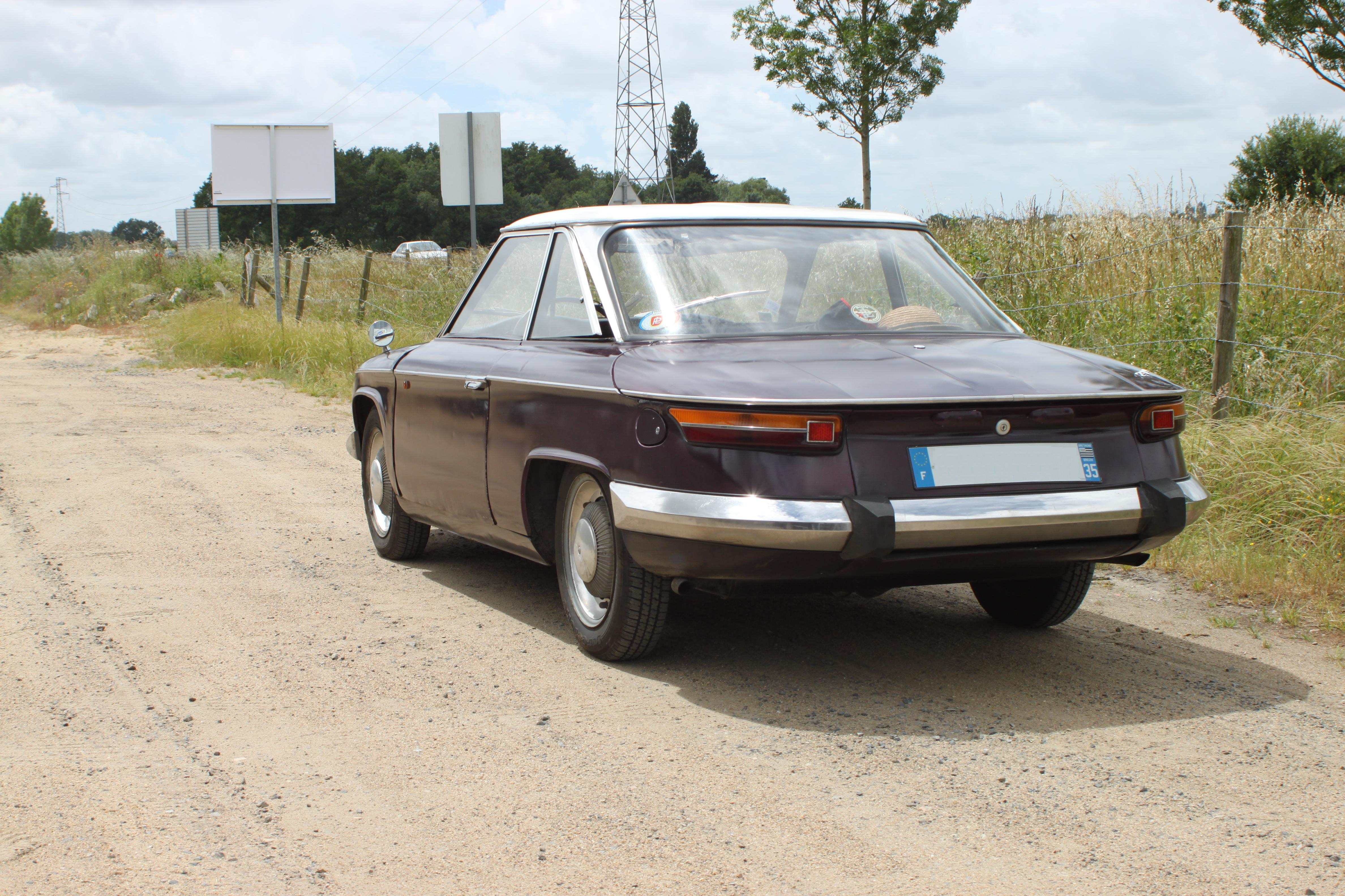 Panhard 24 CT.